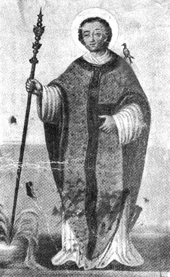 Ursus of Aosta (Orso di Aosta)